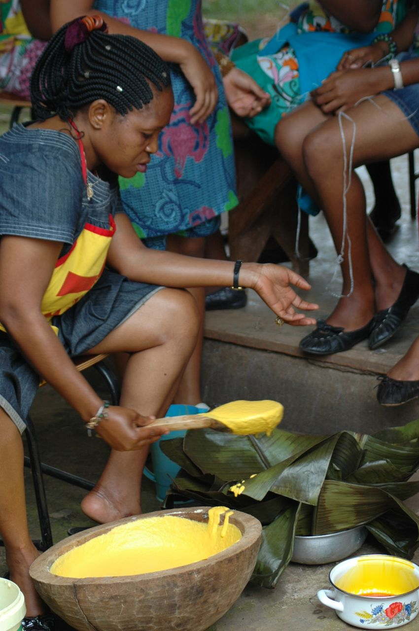 prépration du coki